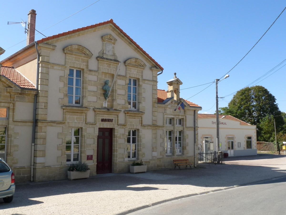 mairie-école d'Ordonnac, Gironde, France